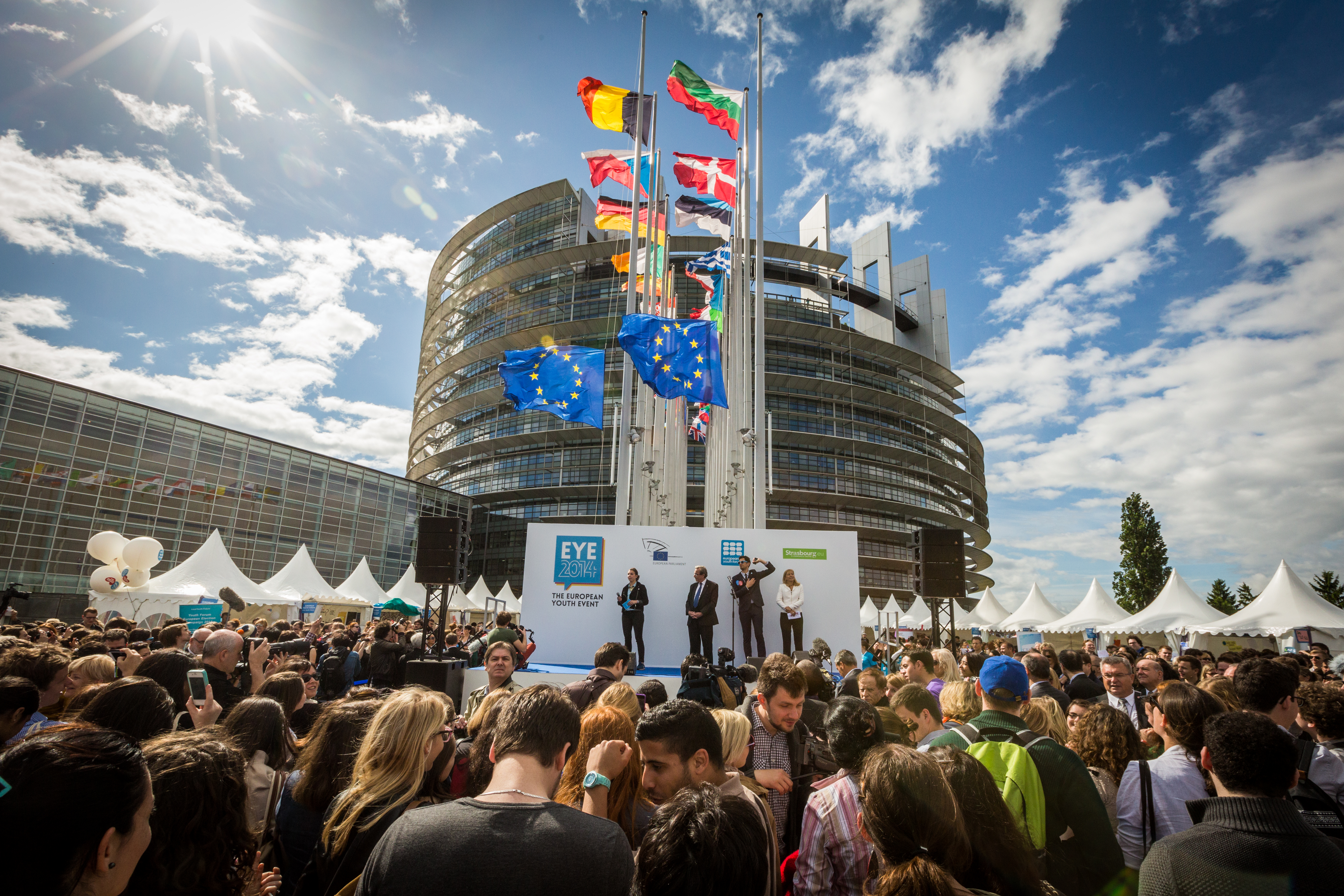 Inauguration EYE2014 Parlement européen Strasbourg 9 mai 2014.